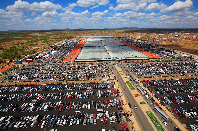 Moda Center Santa Cruz, o maior parque de confecções da América Látina